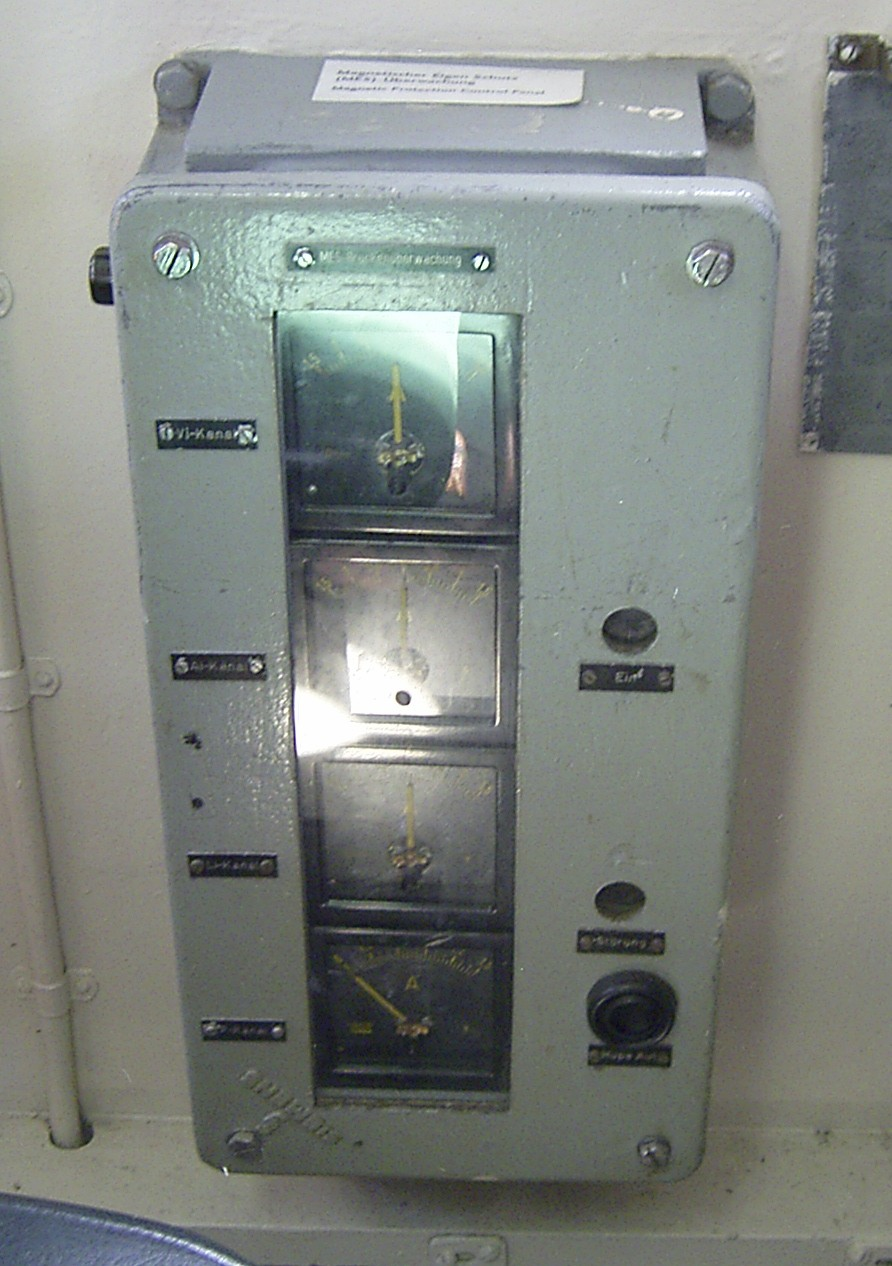 Kontrollkasten der magnetischen Eigenschutzanlage (MES) auf der Brücke des deutschen Minenjagdbootes der Lindau-Klasse "Weilheim"